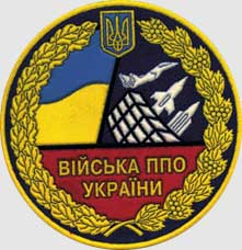 Емблема військ протиповітряної оборони України